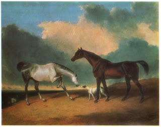 Пасущиеся лошади